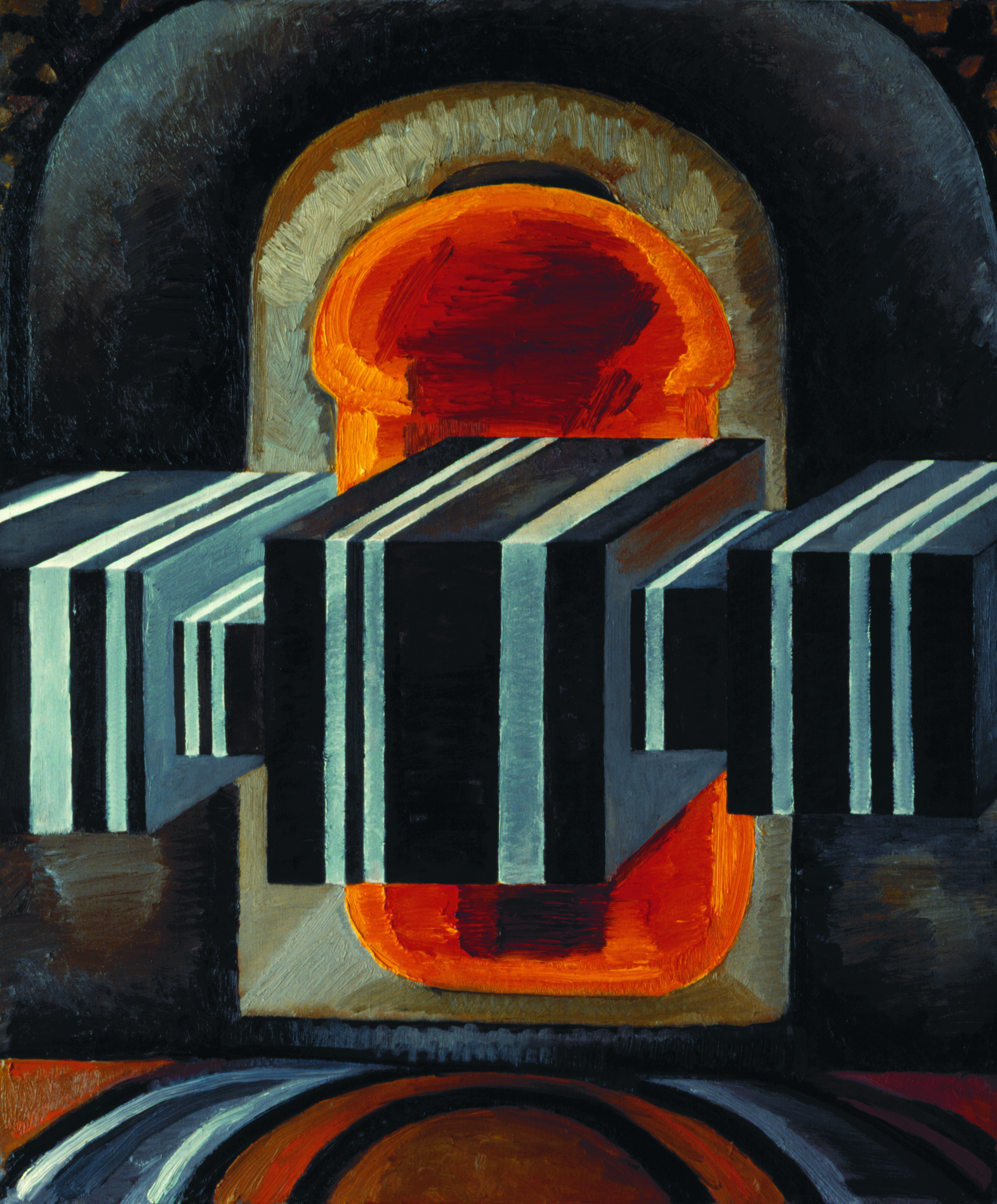 Металическая жизнь 2.